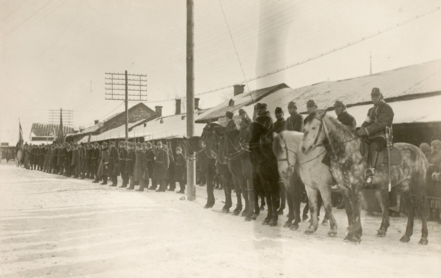 Muuseumikogu Fotokogu Originaal originaal Säilivus määramata